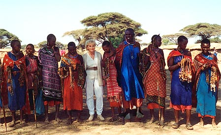 Ruth Baumgarte bei einem Besuch der Massai, Tansania, Anfang der 1990er Jahre